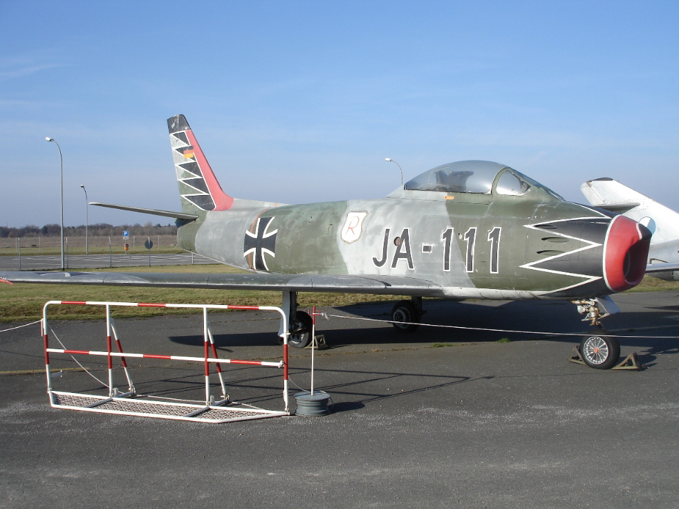 Picture taken at Luftwaffenmuseum der Bundeswehr on Feb 18, 2007